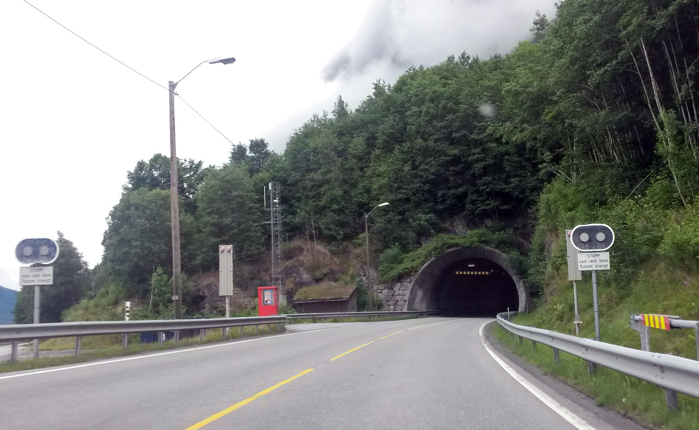 Innfjordtunnelen på E136